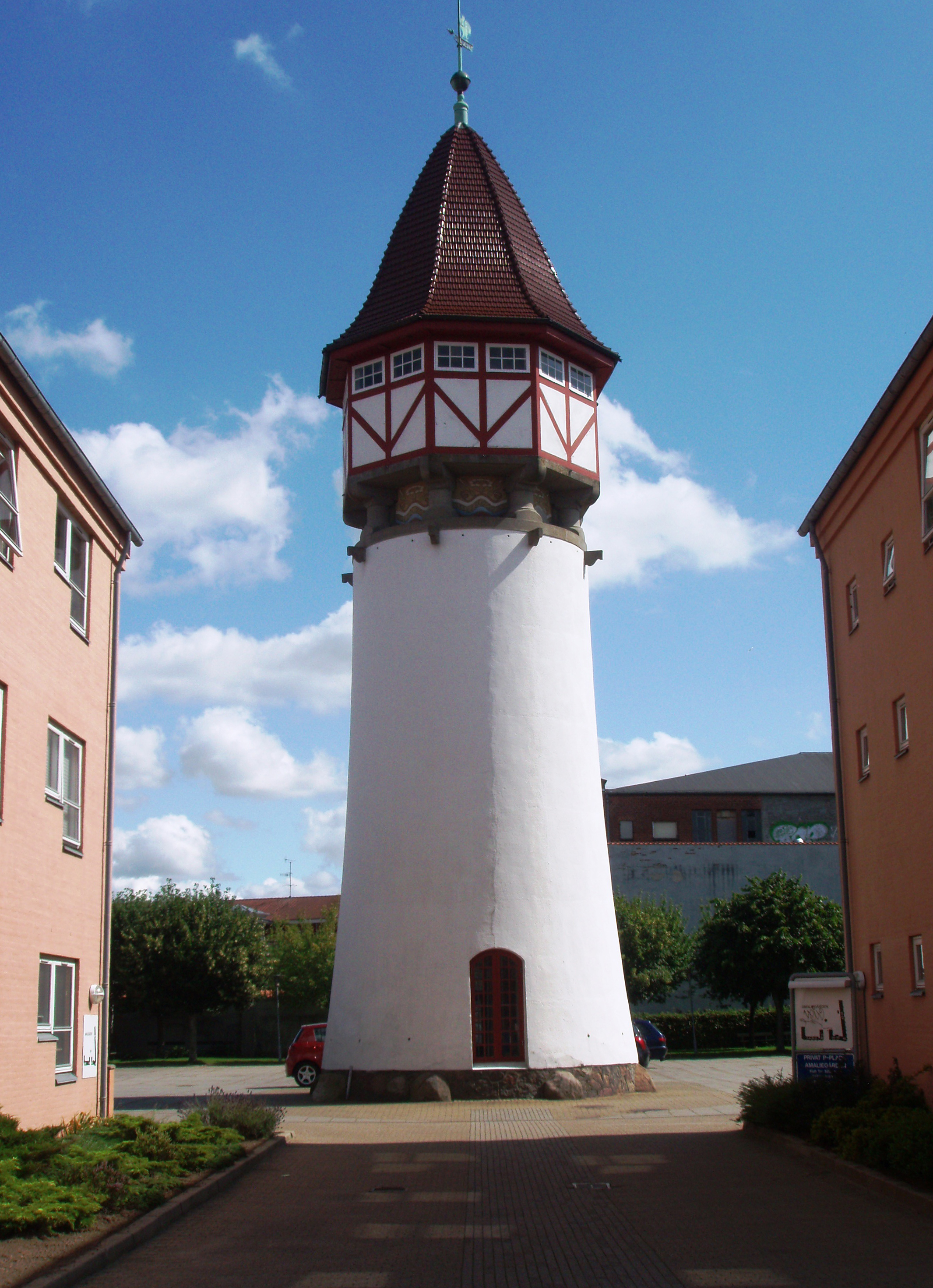 Silkeborg Vandtårn